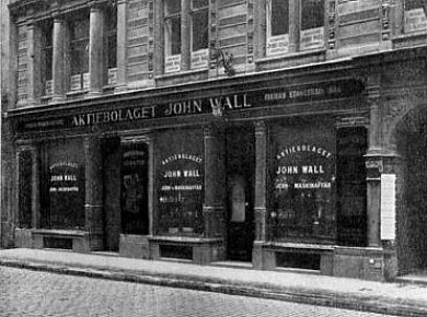 John Walls järnaffär vid Drottningatan 68